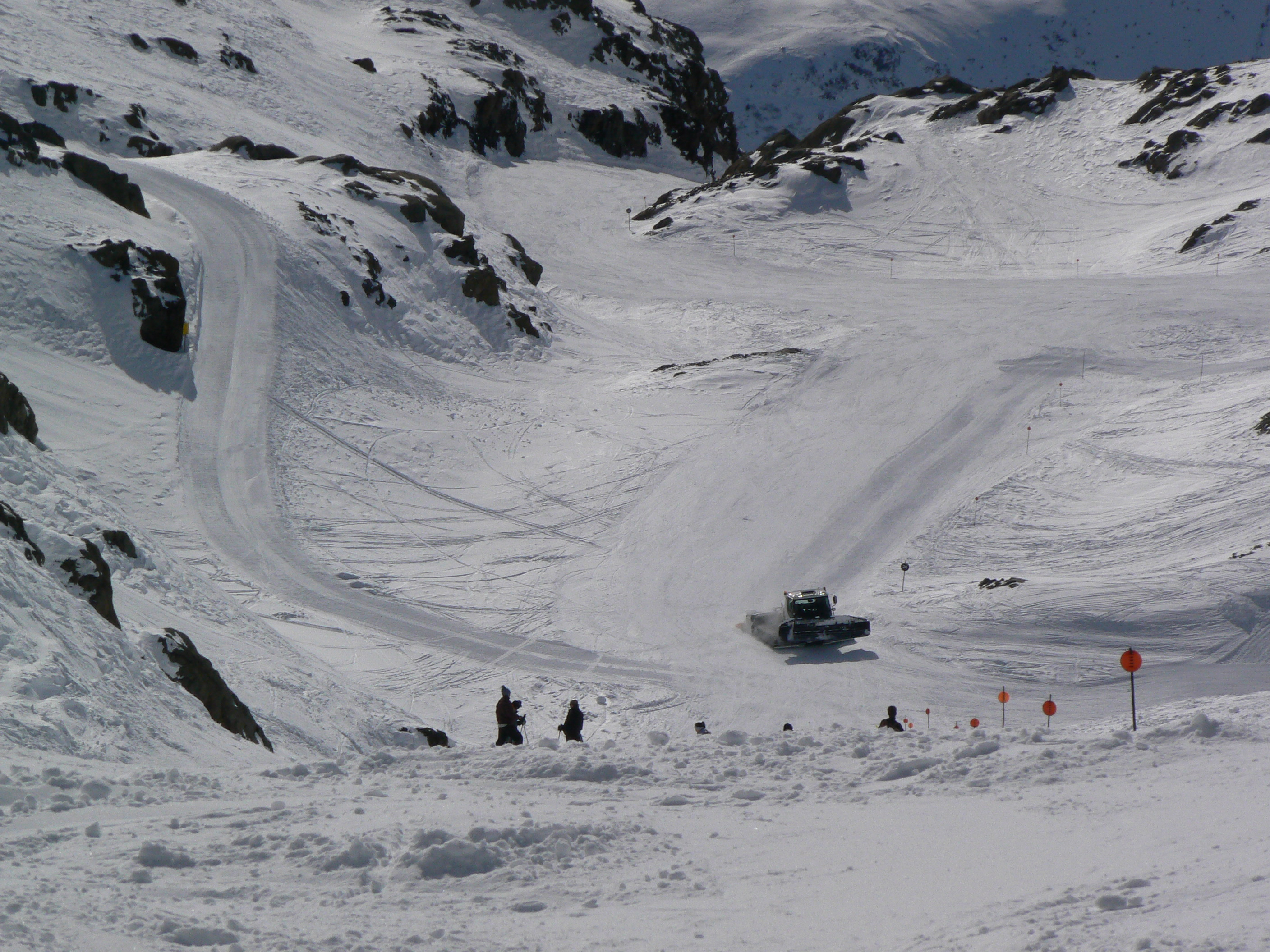 La pista Sarenne del comprensorio Grandes Rousses.